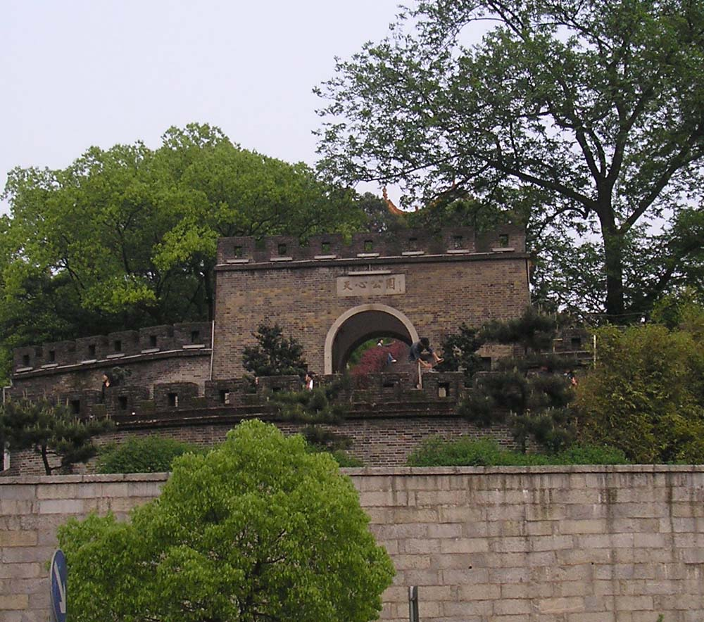 长沙天心阁，2006年4月15日/Cncs拍摄